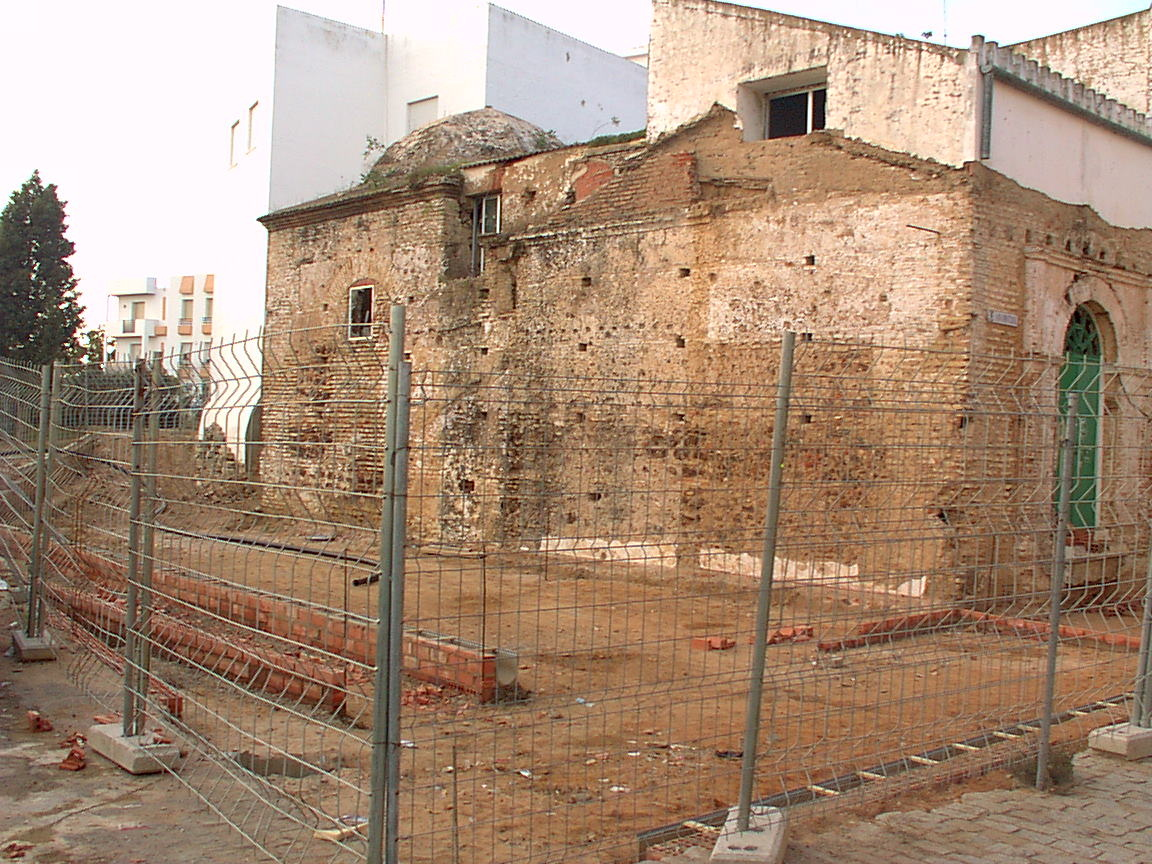 Capilla de San Cristóbal, en Lepe, antes de su restauración.